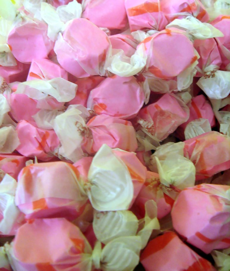 cherry taffy